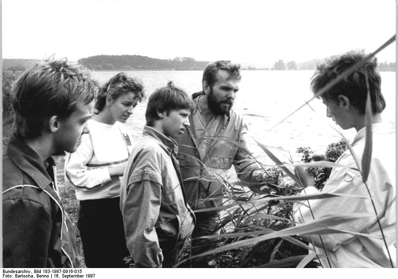 Schülergruppe Ornithologie und Naturschutz ADN-ZB Bartocha 16.9.87 Bez. Neubrandenburg: Naturschutz und Naherholung- Häufig ist der Lehrer Gerhard Heclau mit den Mitgliedern seiner Arbeitsgemeinschaft Ornithologie und Naturschutz in dem von ihm betreuten Naturschutzgebiet an der Feisneck, einem kleinen Binnensee. Dank seiner Initiative wurde das durch die Naherholungssuchenden erheblich belastete Gebiet 1979 unter Schutz gestellt. siehe ADN Bezirkskorrespondenz vom 17.9.87